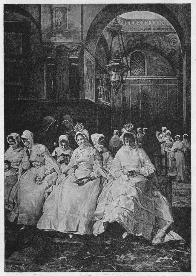 Die Novizen in Rom